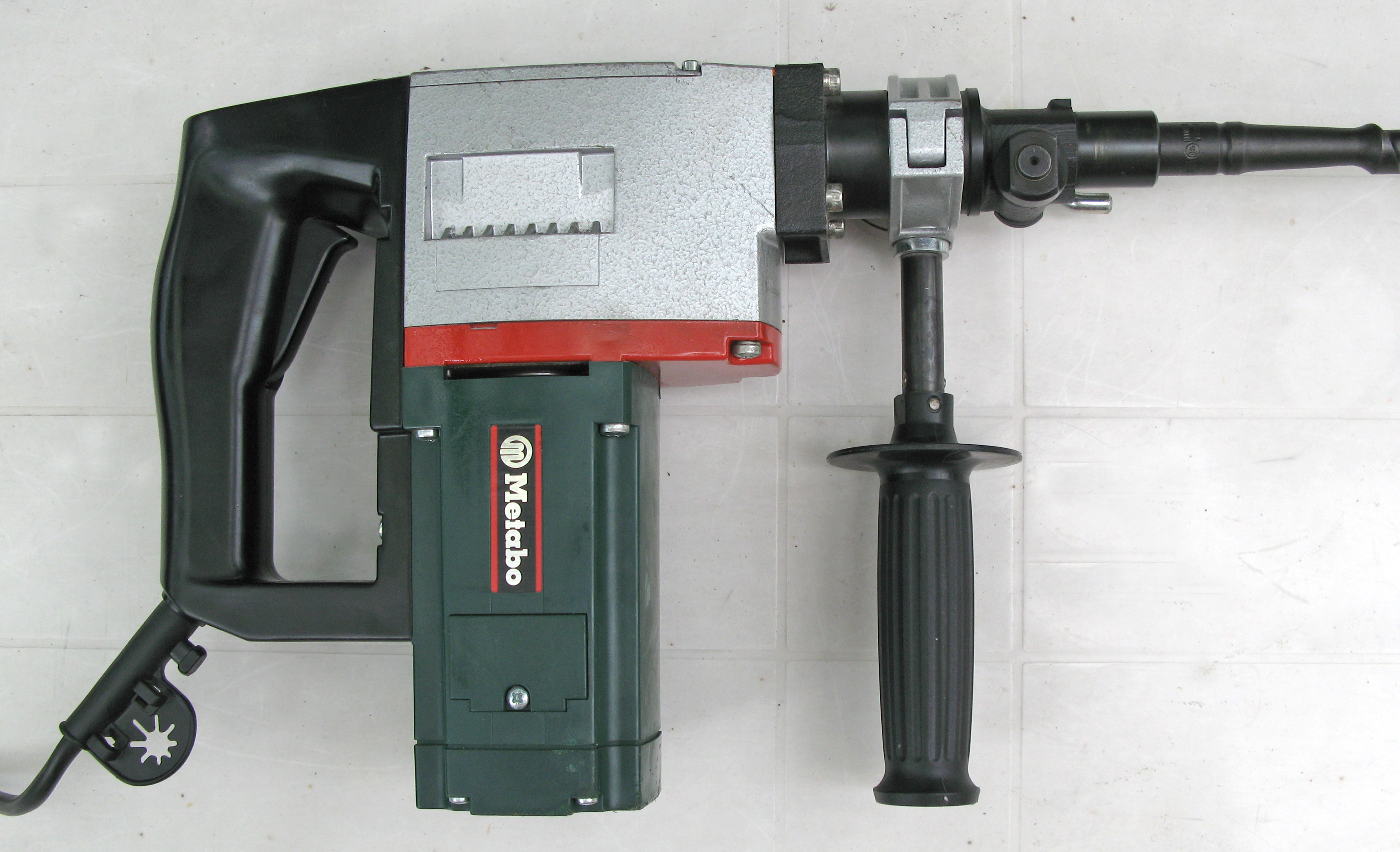 Buerhummer.